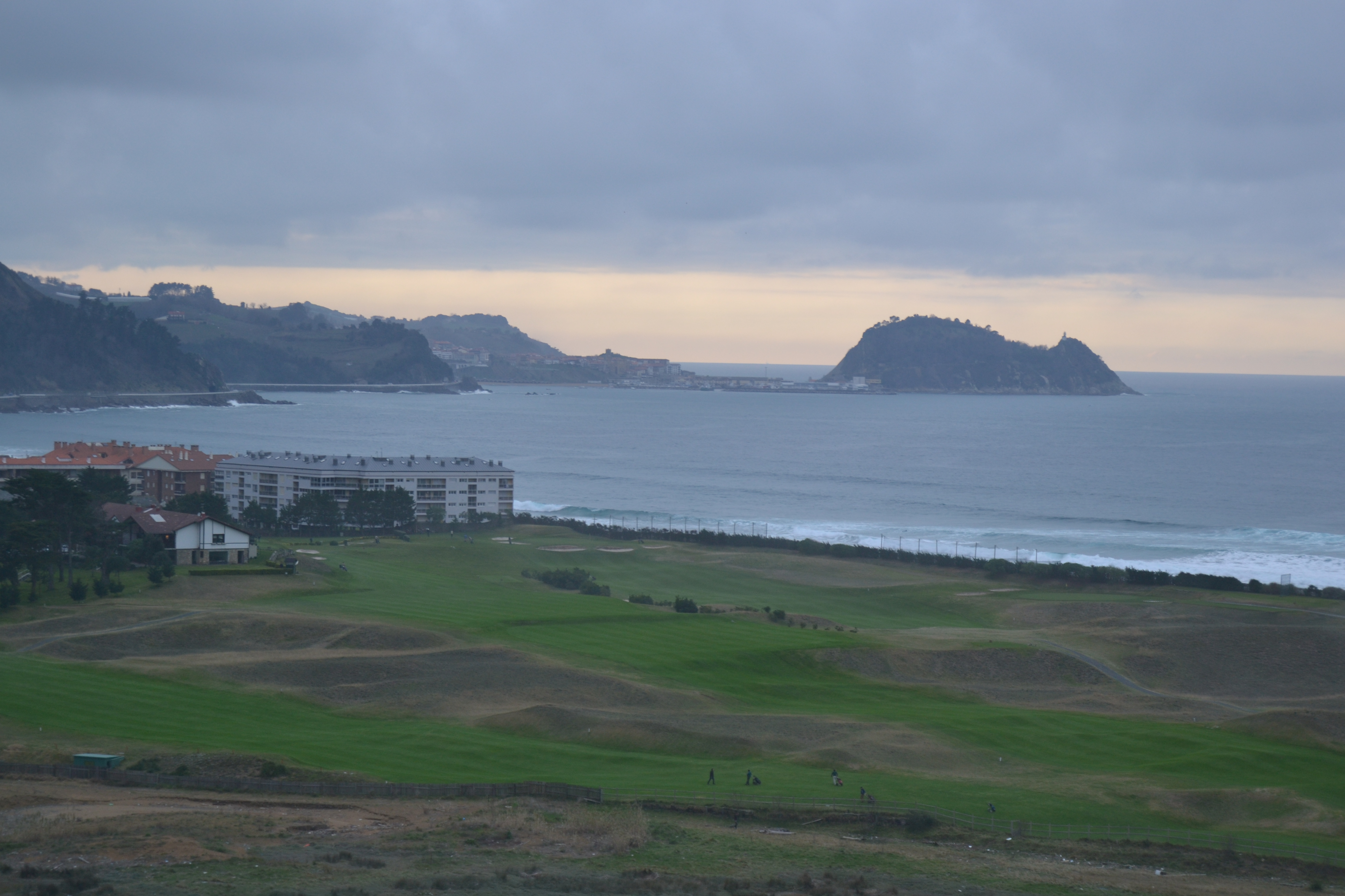 Getariako ikuspegia Zarauztik. Gipuzkoa, Euskal Herria. View of Getaria from Zarautz. Gipuzkoa, Basque Country.